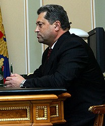 НОВО-ОГАРЕВО. Губернатор Смоленской области Виктор Маслов на встрече с Президентом Российской Федерации Владимиром Путиным.